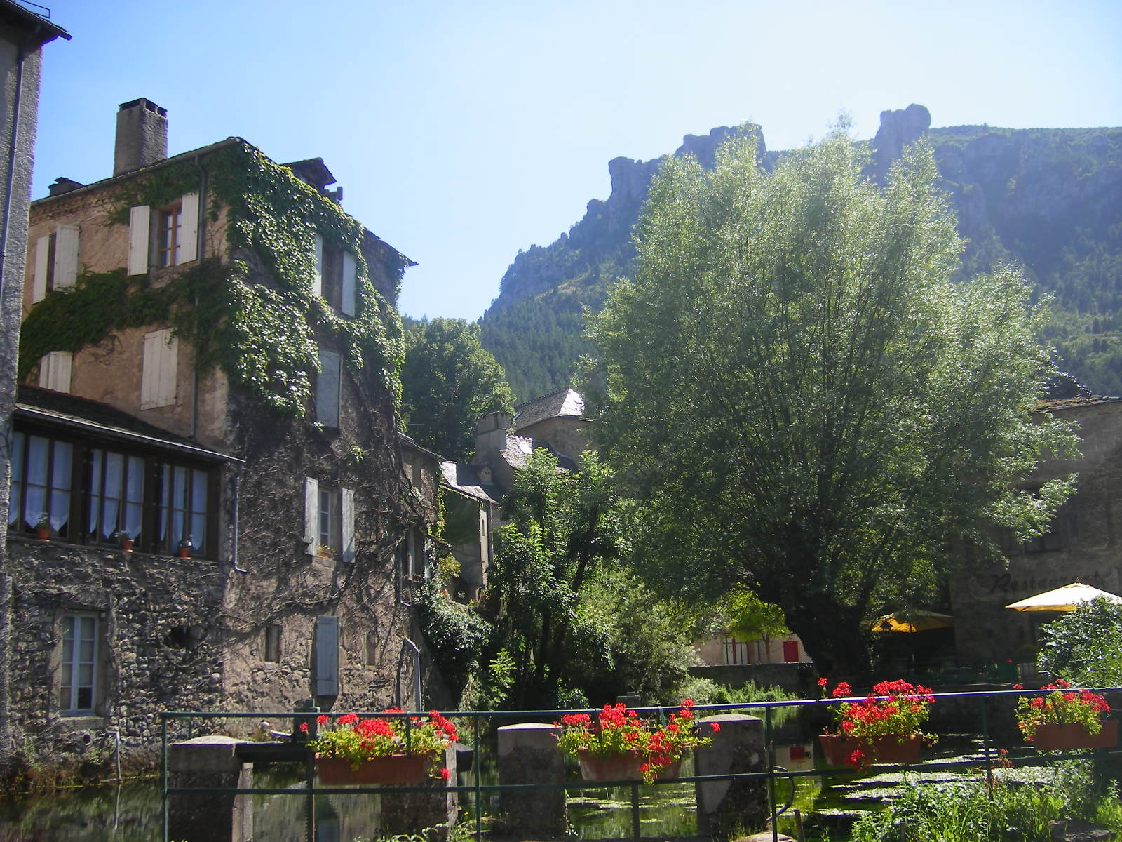 Florac, France